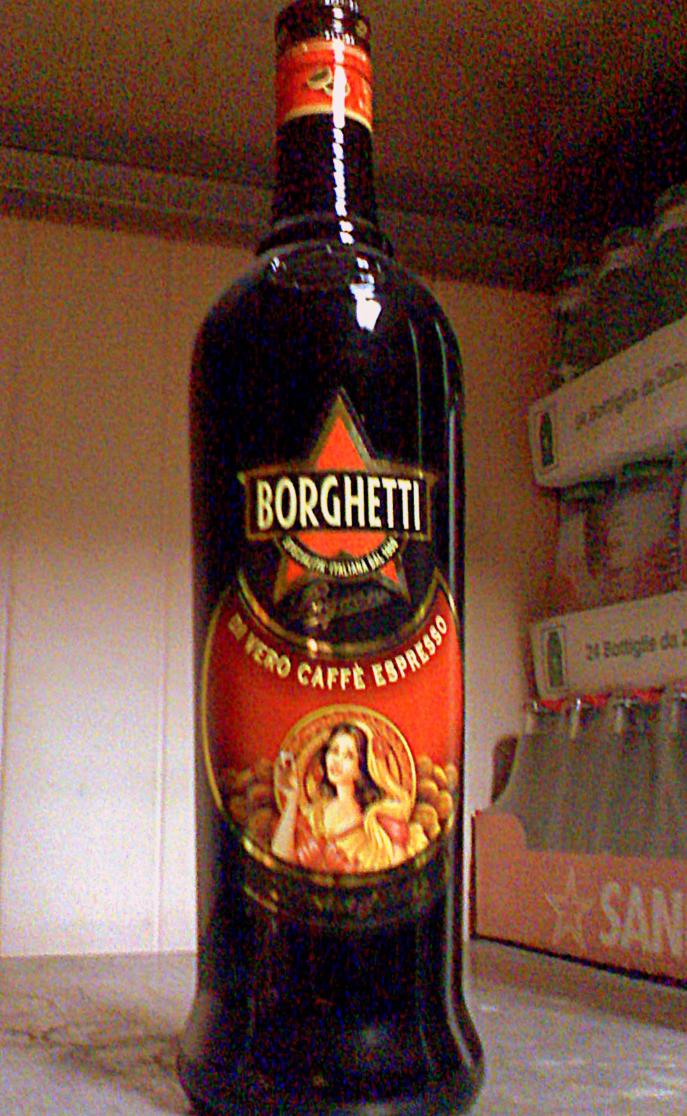 In un bar di Roma.